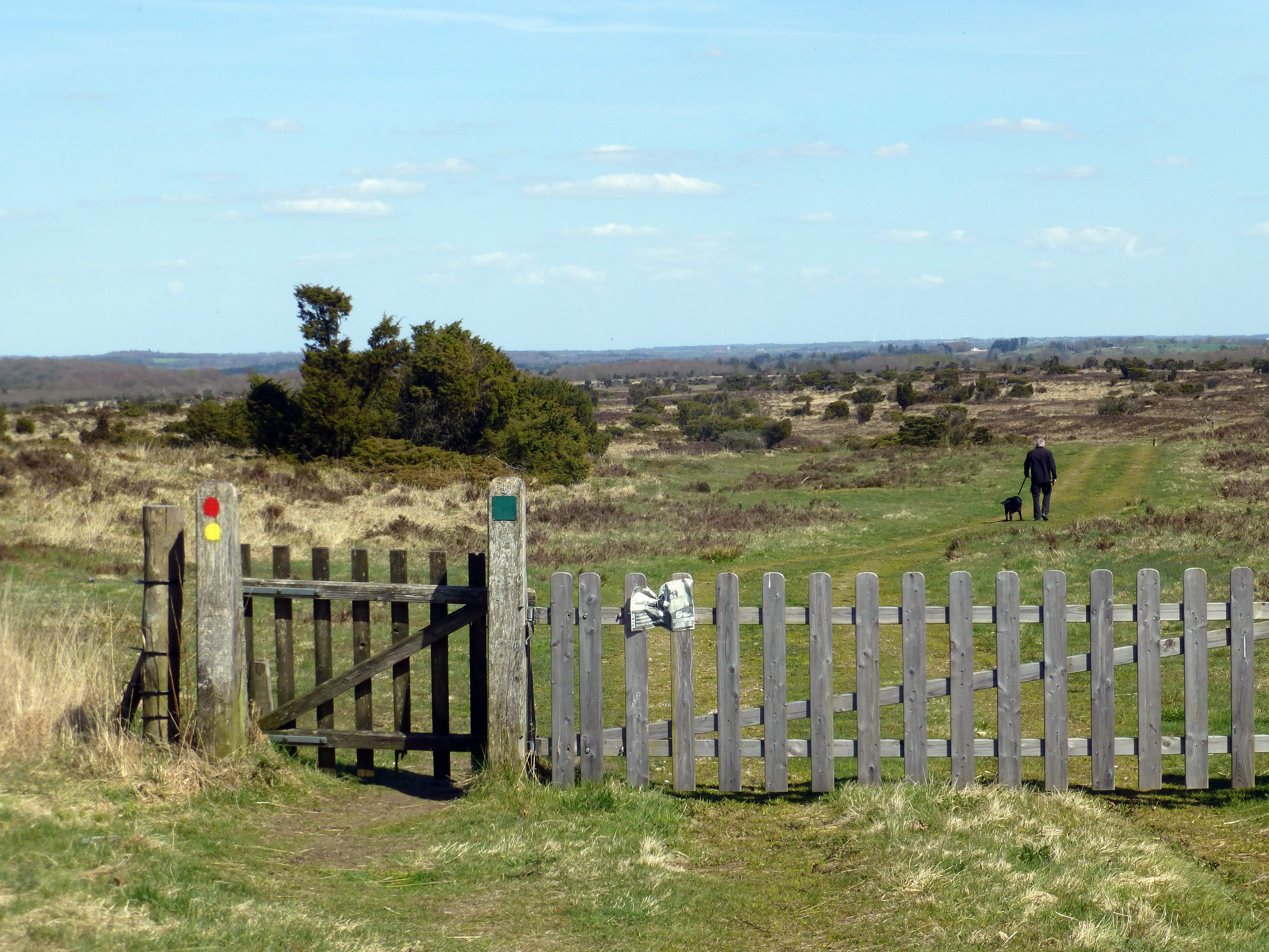 Stanghede vest for Hald Sø ved Viborg